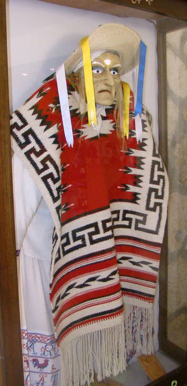 Vestimenta típica de la Danza de los Viejitos